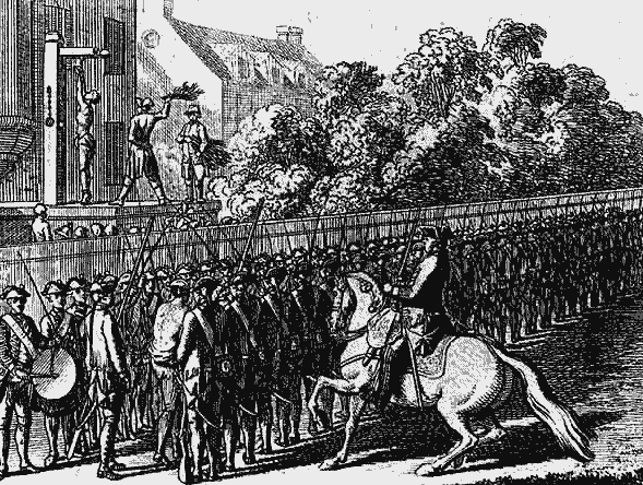 Die Militärstrafe Gassenlaufen